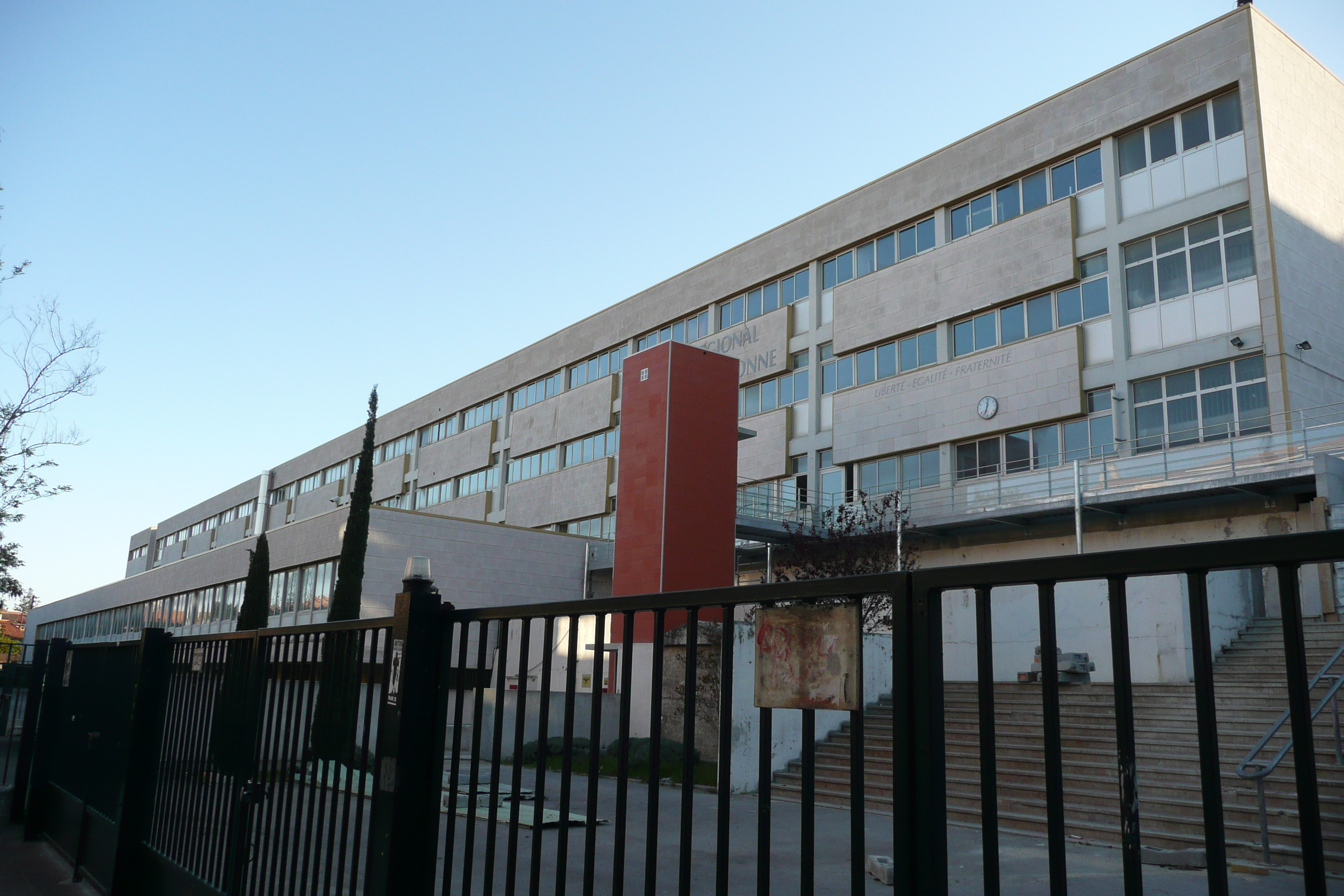 Lycèe Adam de Craponne à Salon-de-Provence.